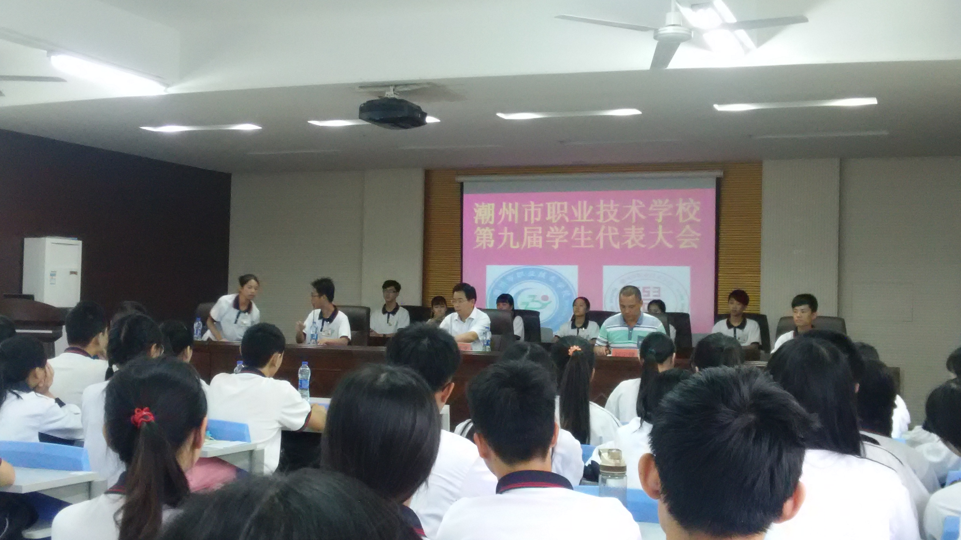 2015年10月11日16时，潮州市职业技术学校学生会在综合楼八楼会议室召开第九届学生代表大会，许旭文校长正在发表讲话。